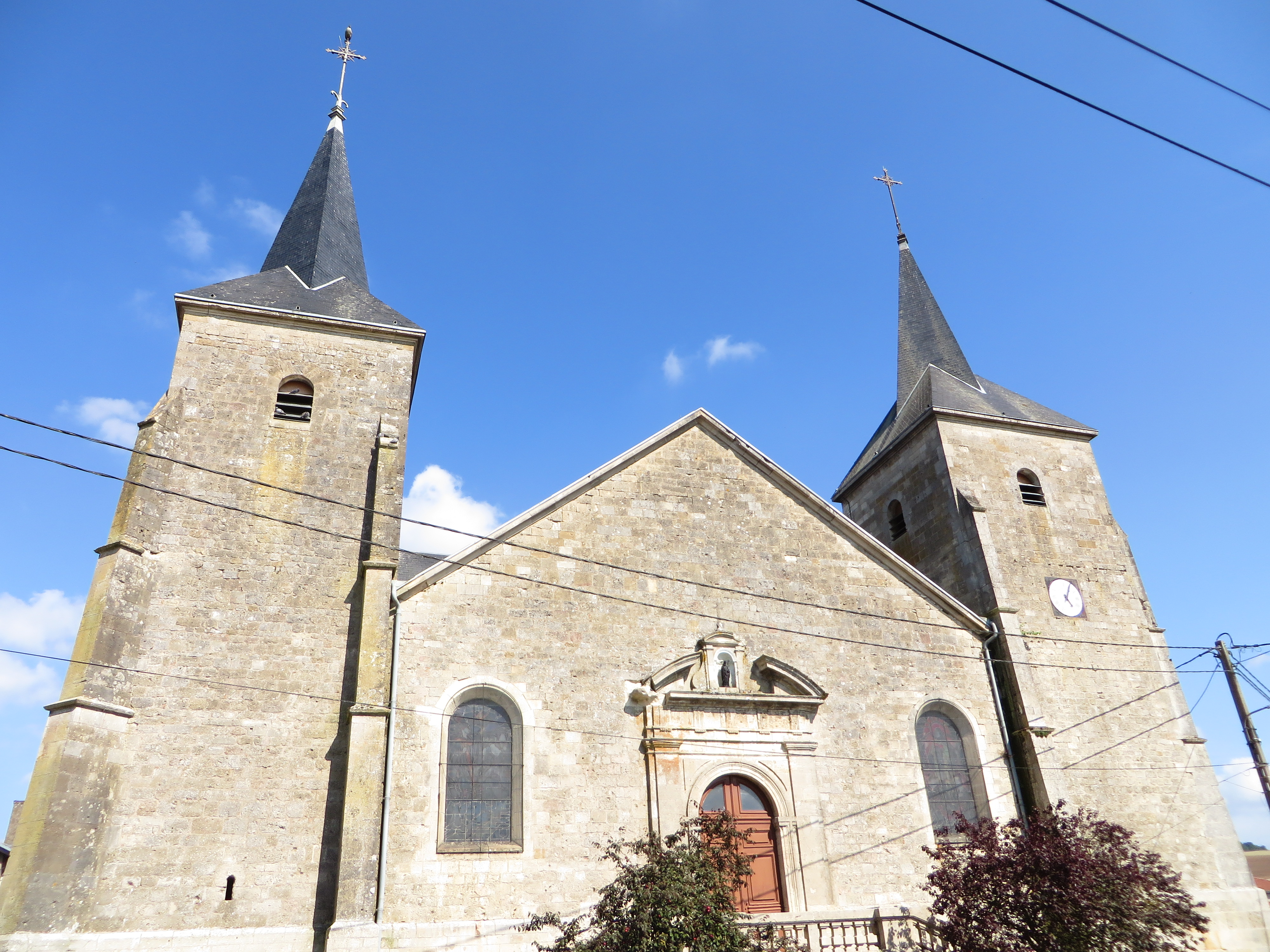 Sivry-sur-Meuse L'église Saint-Rémi